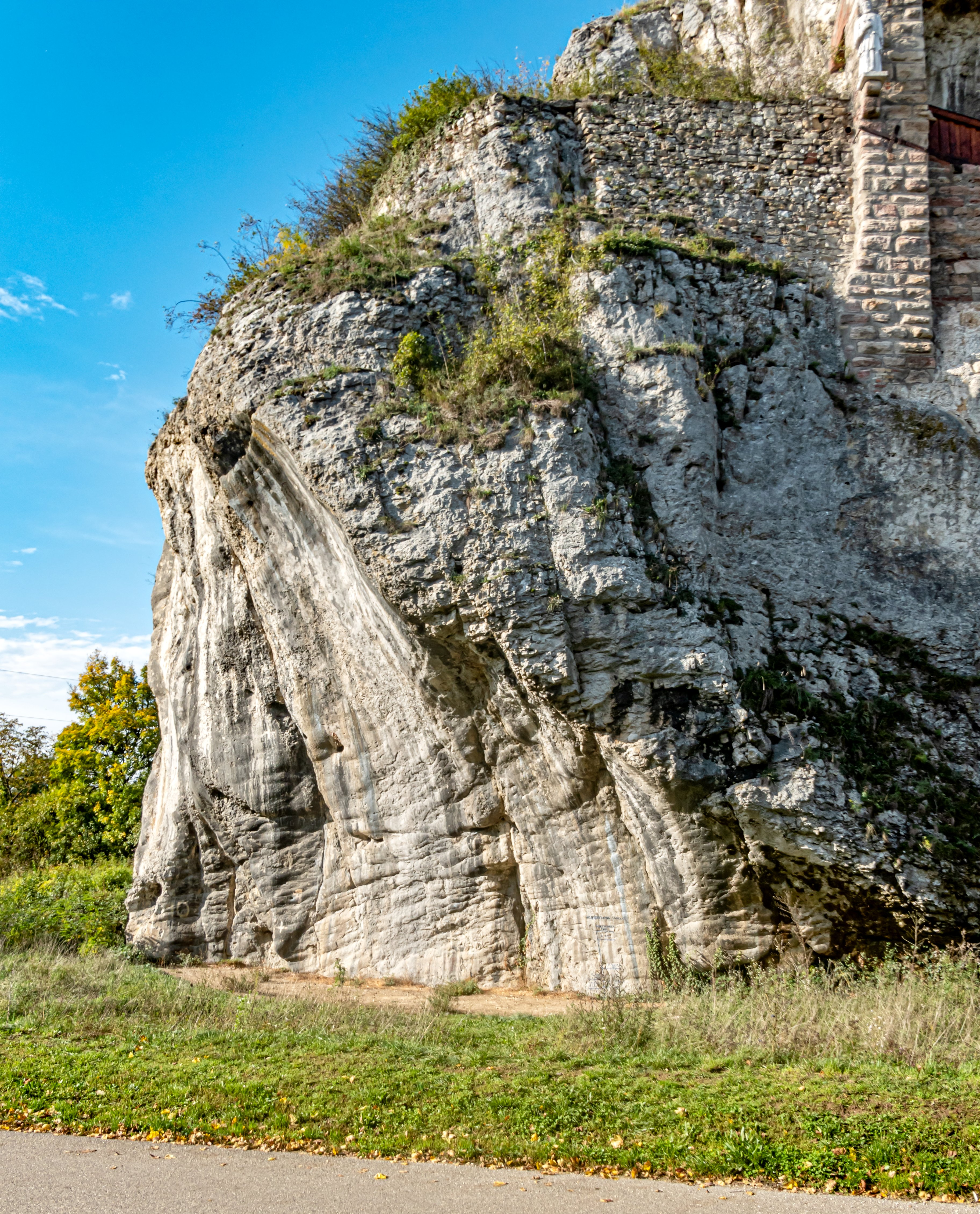 Bilder vom Isteiner Klotz am 20. 10. 2019